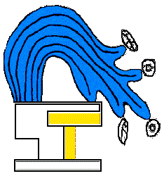 Glifo de Calnali